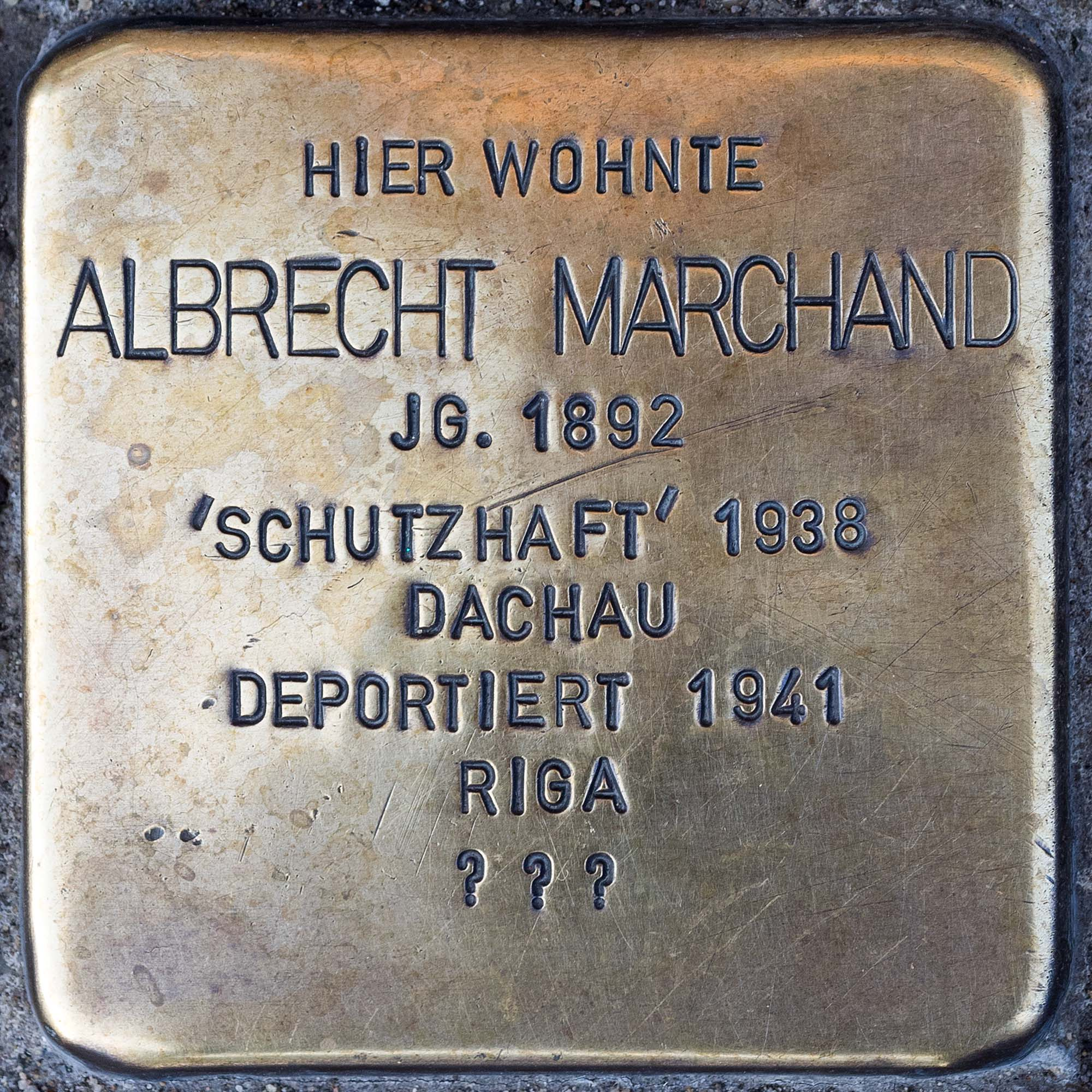 Stolpersteine Toevo Albrecht Marchand